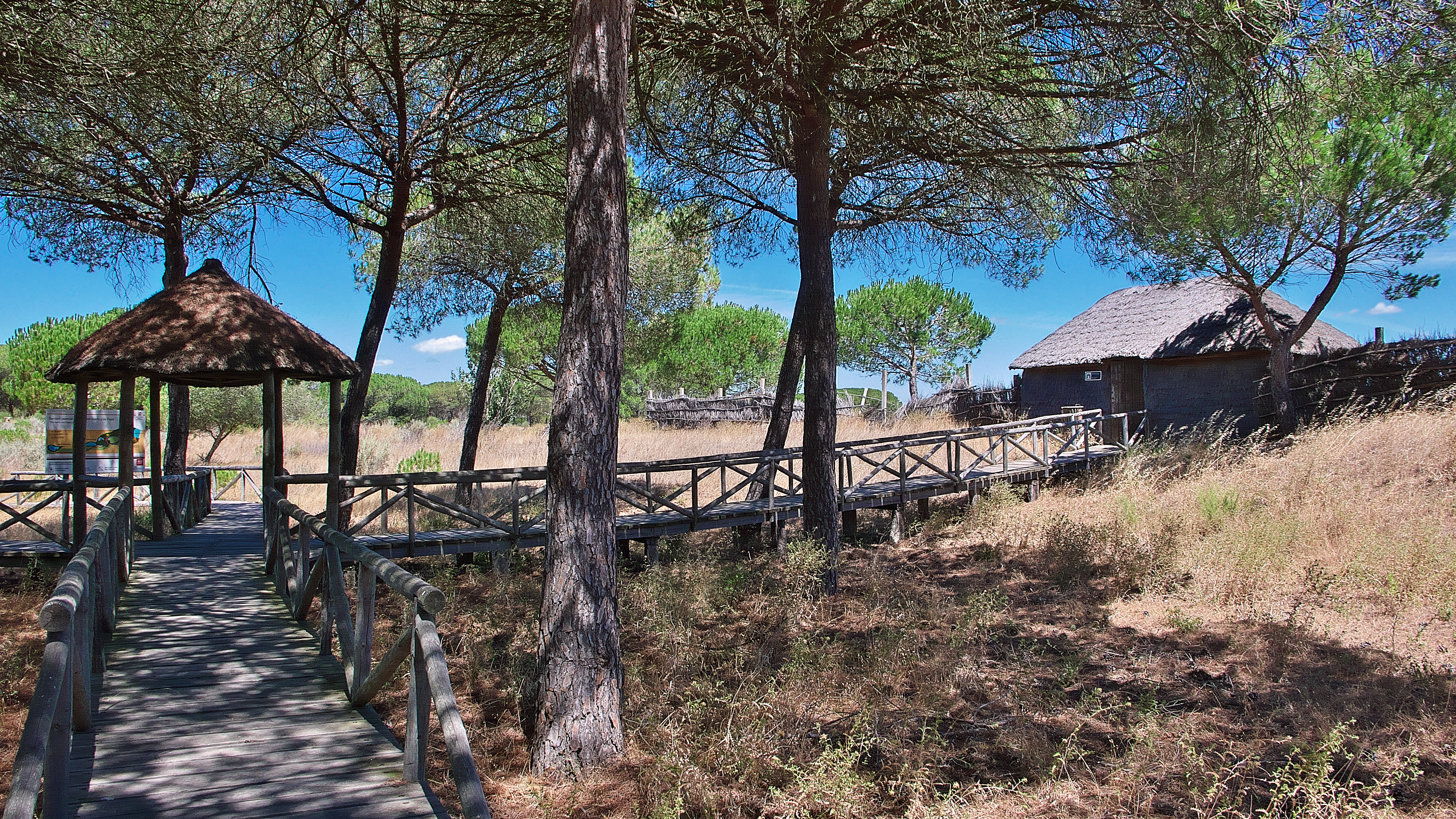 El Acebuche, Centro de visitantes del Parque Nacional de Doñana.